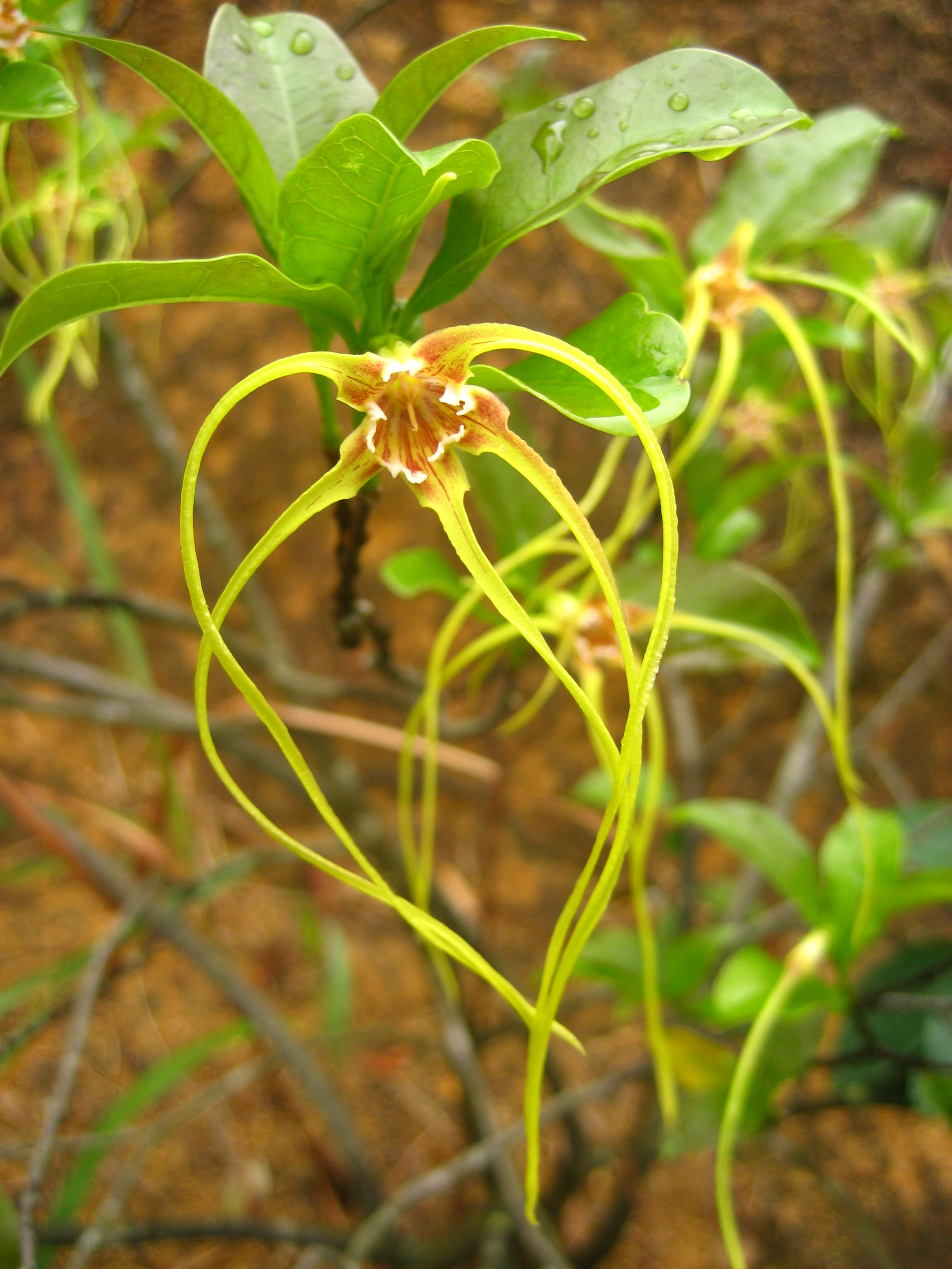 羊角拗的花朵，摄于深圳